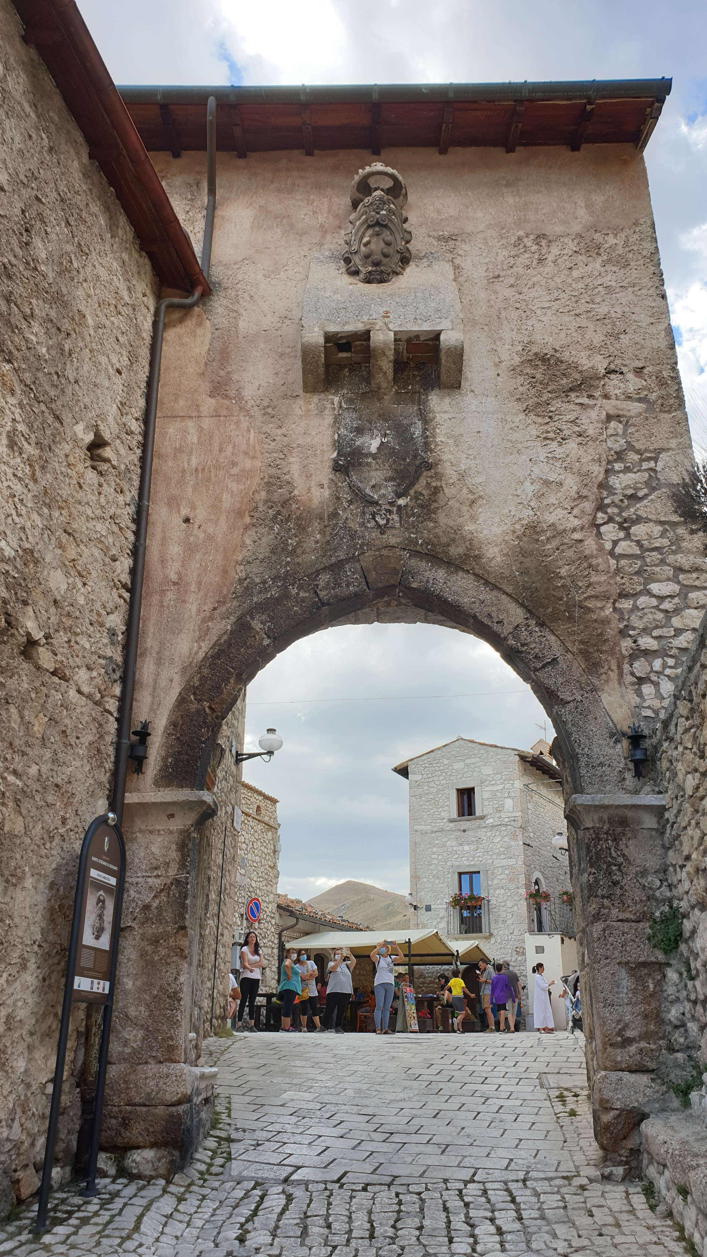 Santo Stefano di Sessanio